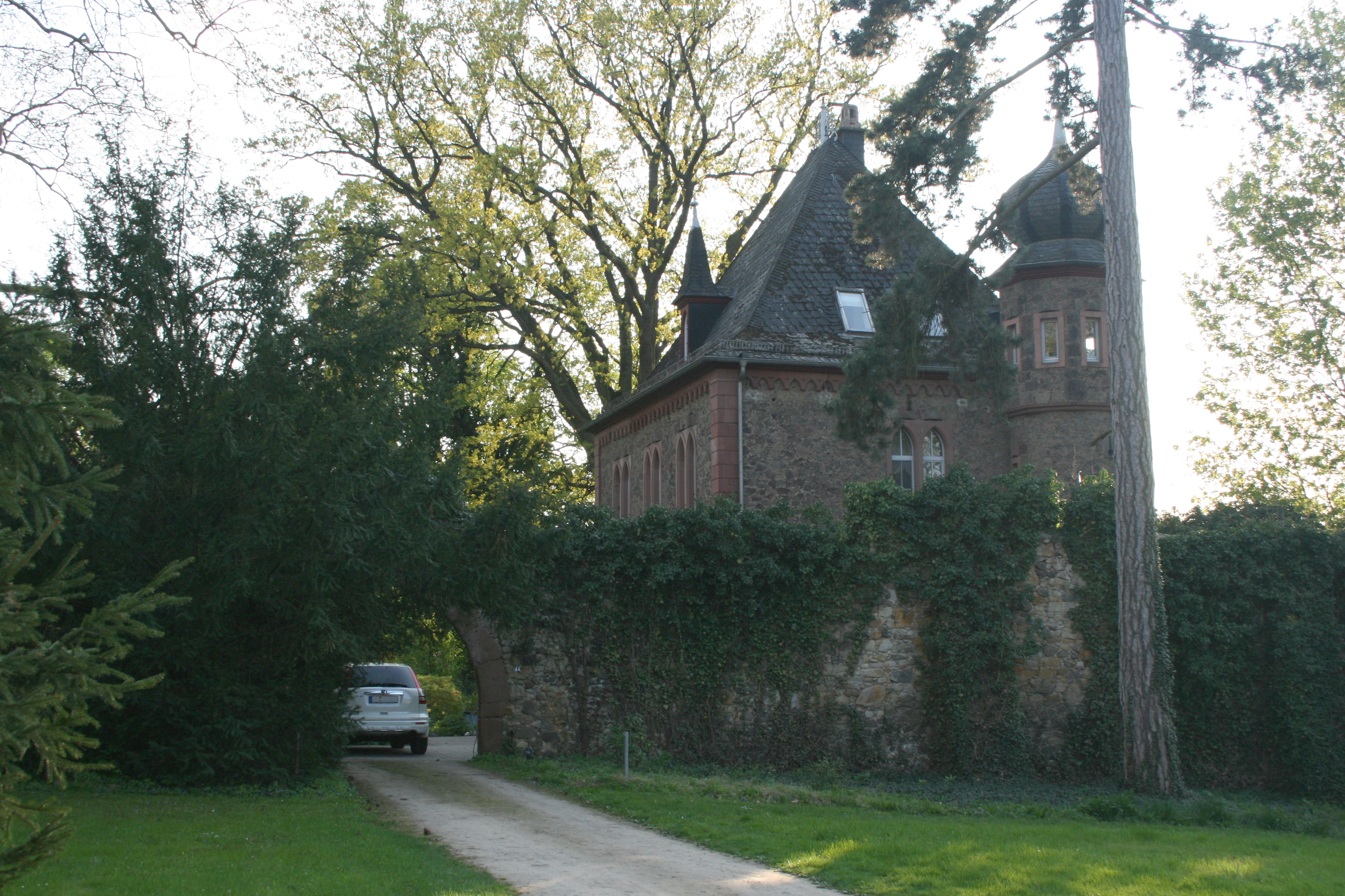 Schloss Assenheim, Niddatal, Hessen, Ansicht des neugotischen Archivbaus.